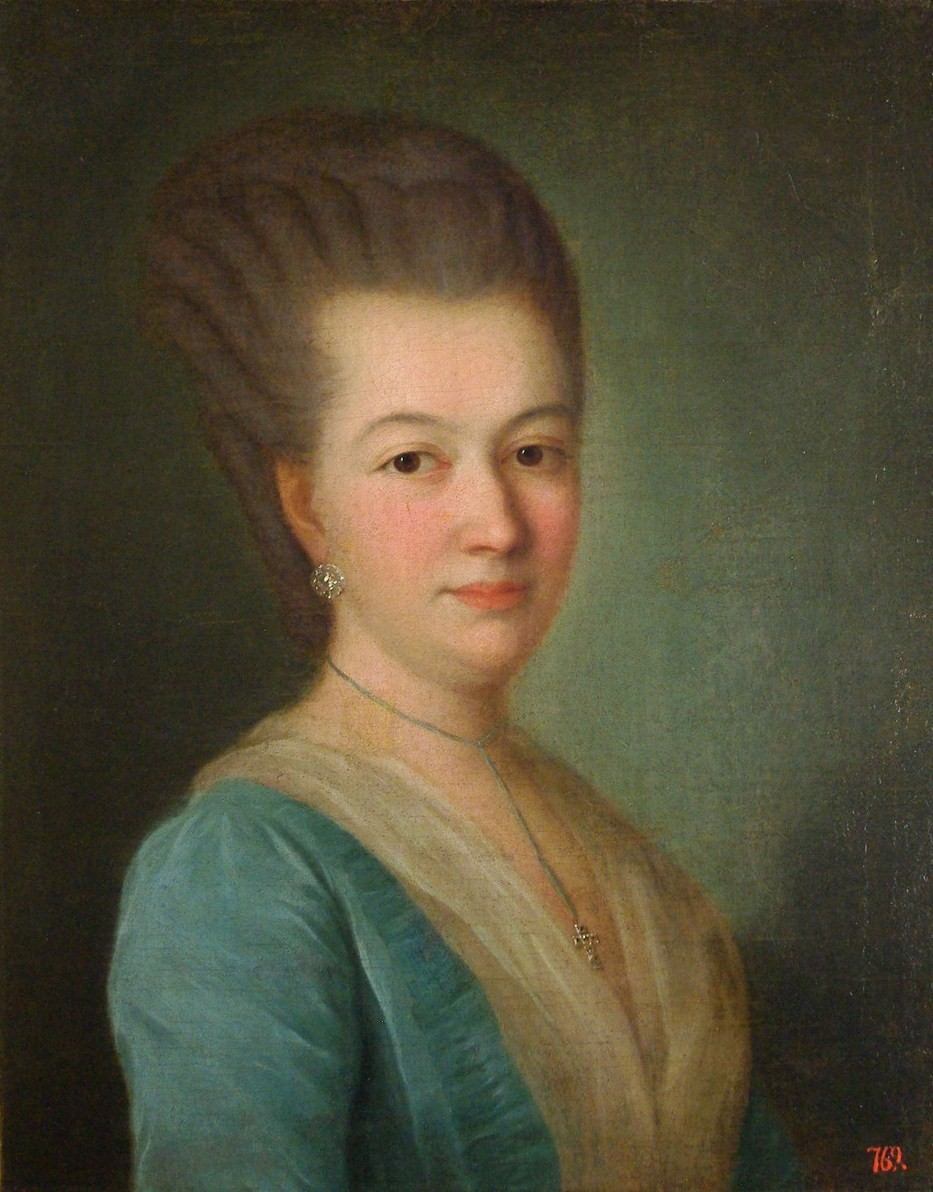 Екатерина Петровна Чичерина, урожденная графиня Девиер, жена Александра Денисовича Чичерина (ум. 1786)